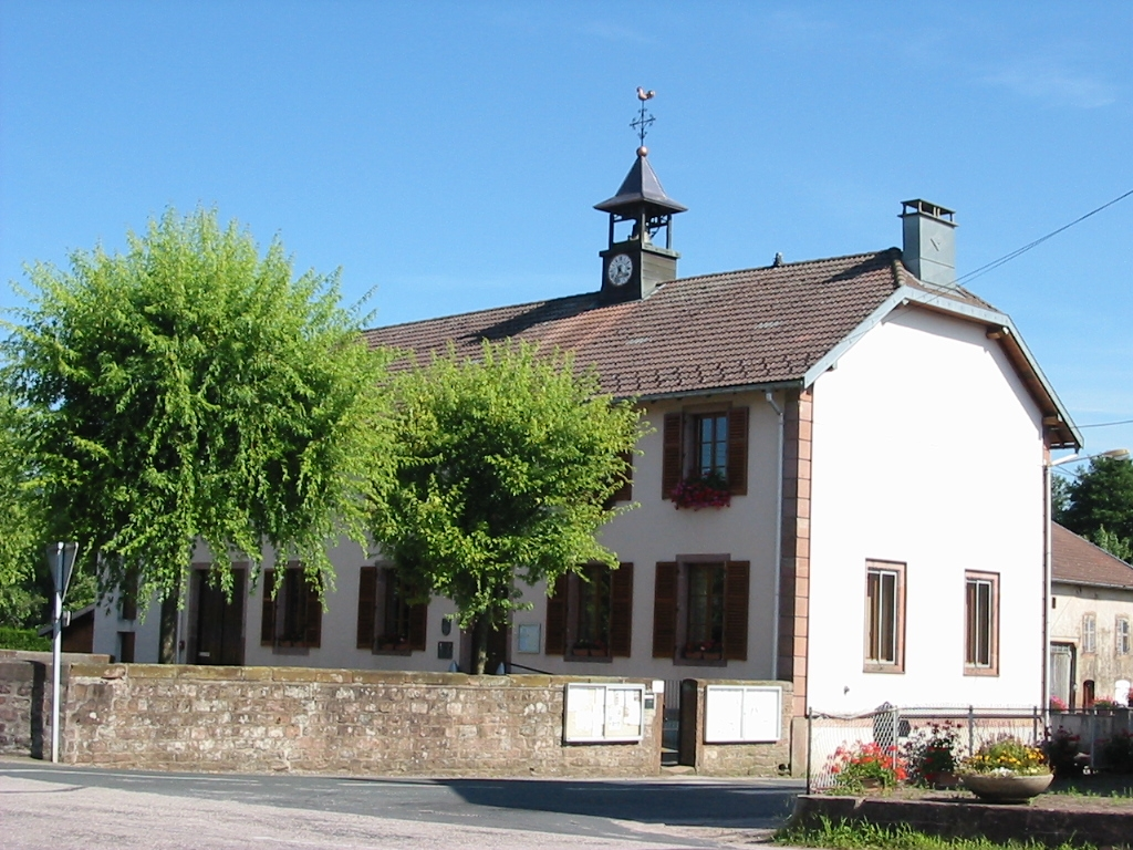 La mairie de Neuvillers-sur-Fave, commune des Vosges dans le canton de Saint-Dié-Est.